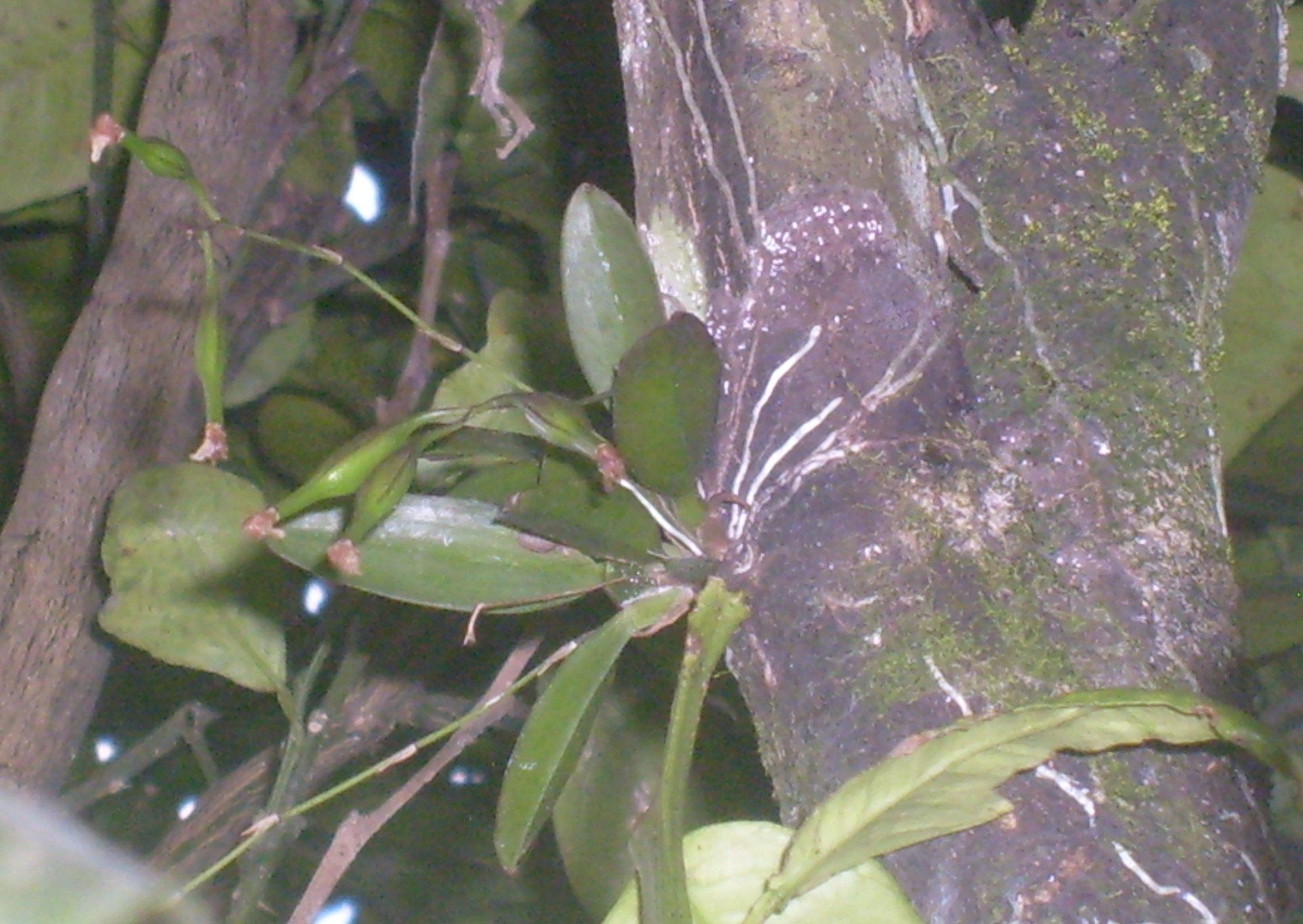 Acá podemos ver una Llovizna Magenta con los bulbos, lista para dispersar las semillas.